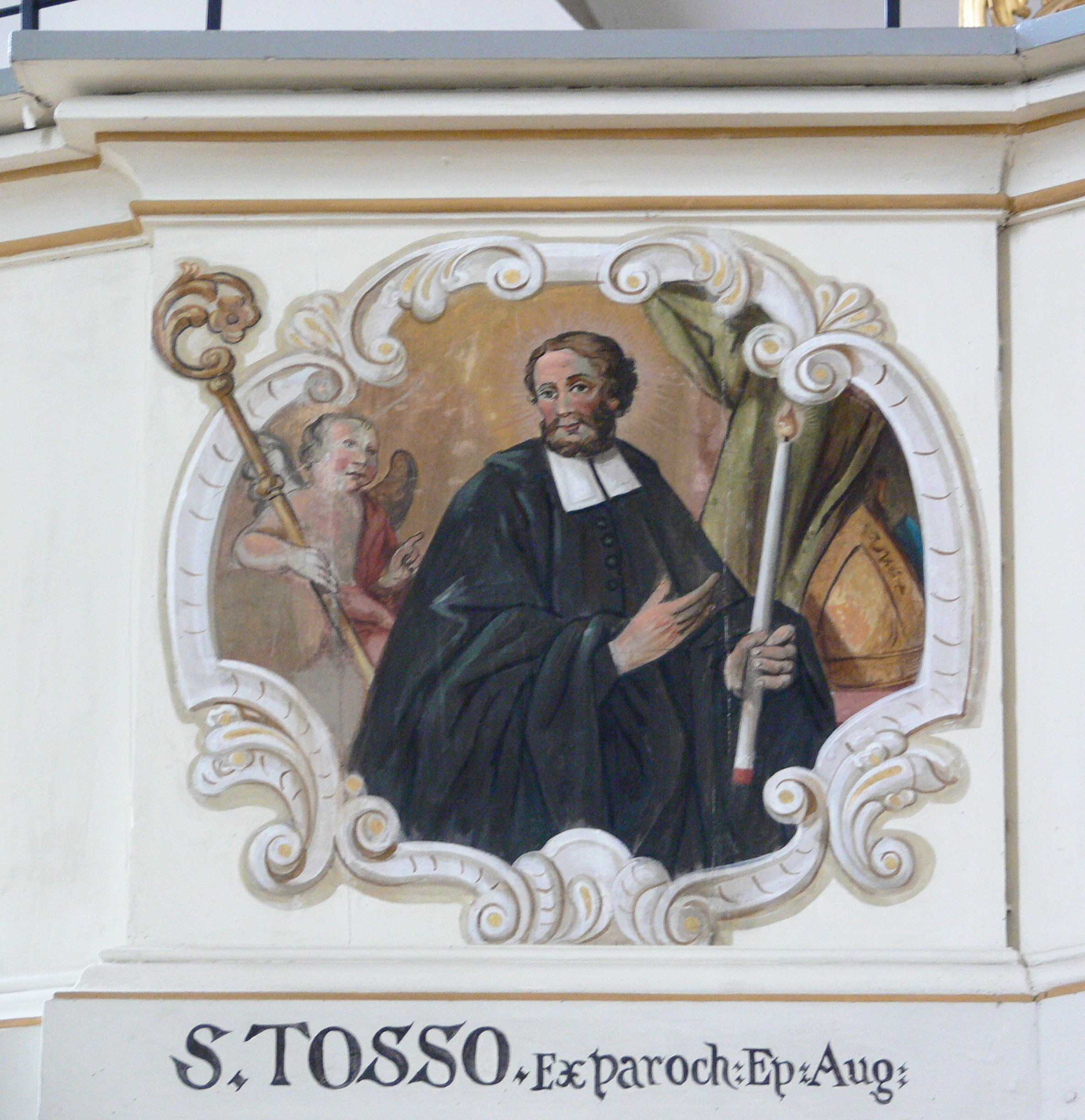 Stiftskirche Heilig Kreuz, Horb am Neckar Orgelempore (evtl. von Anton Hermann, 1781-1782): Hl. Tosso (Tozzo), in einfachem Chorherrengewand (nach Horber Überlieferung ein Porträt des Chorherrn Carl Dominicus Geßler)